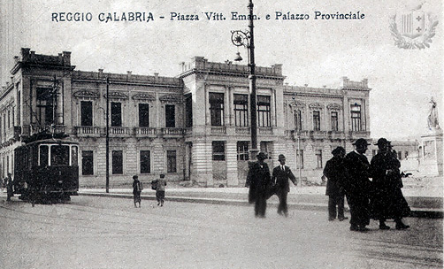 Reggio Calabria - Camillo Autore e Gaetano Spinelli, Palazzo della Provincia - Antica cartolina. - old postcard